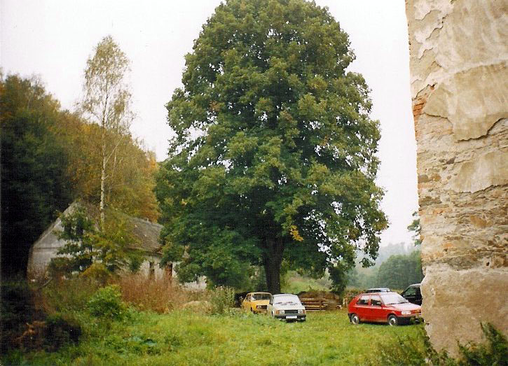 Lípa u Kaceřovského mlýna.